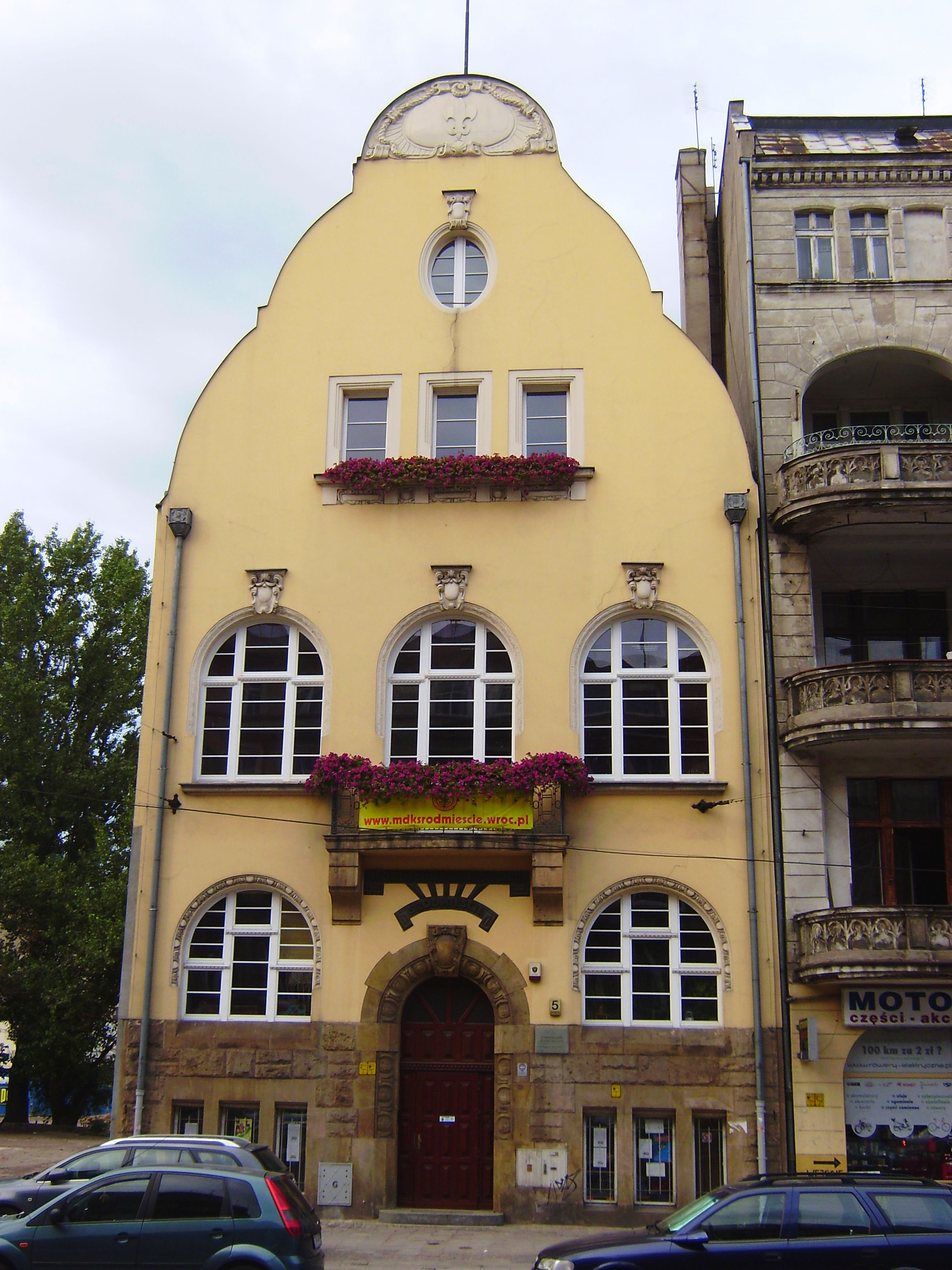 ehemaliges Corpshaus des Corps Lusatia in Breslau